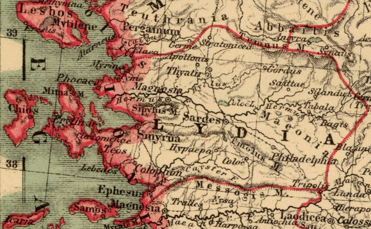 Lycaonia. Asia citerior. Auctore Henrico Kiepert Berolinensi. Geographische Verlagshandlung Dietrich Reimer (Ernst Vohsen) Berlin, Wilhemlstr. 29. (1903)